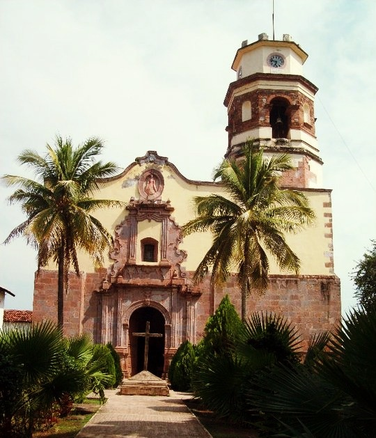 La iglesia de La Asunción de María de Cutzamala (México) la empieza a construir fray Juan Bautista Moya en 1555 después de la Pungarabato y Tuzantla; su construcción duró diez años prestándose en el trabajo todos los indígenas de la población. el Generalísimo Morelos califica a la iglesia de Cutzamala como La Mejor de Tierra Caliente.